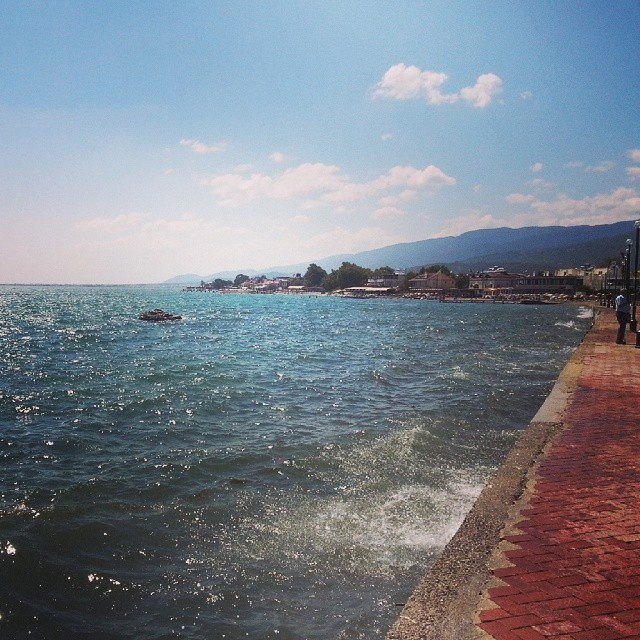 Akçay sahilinden bir görüntü.